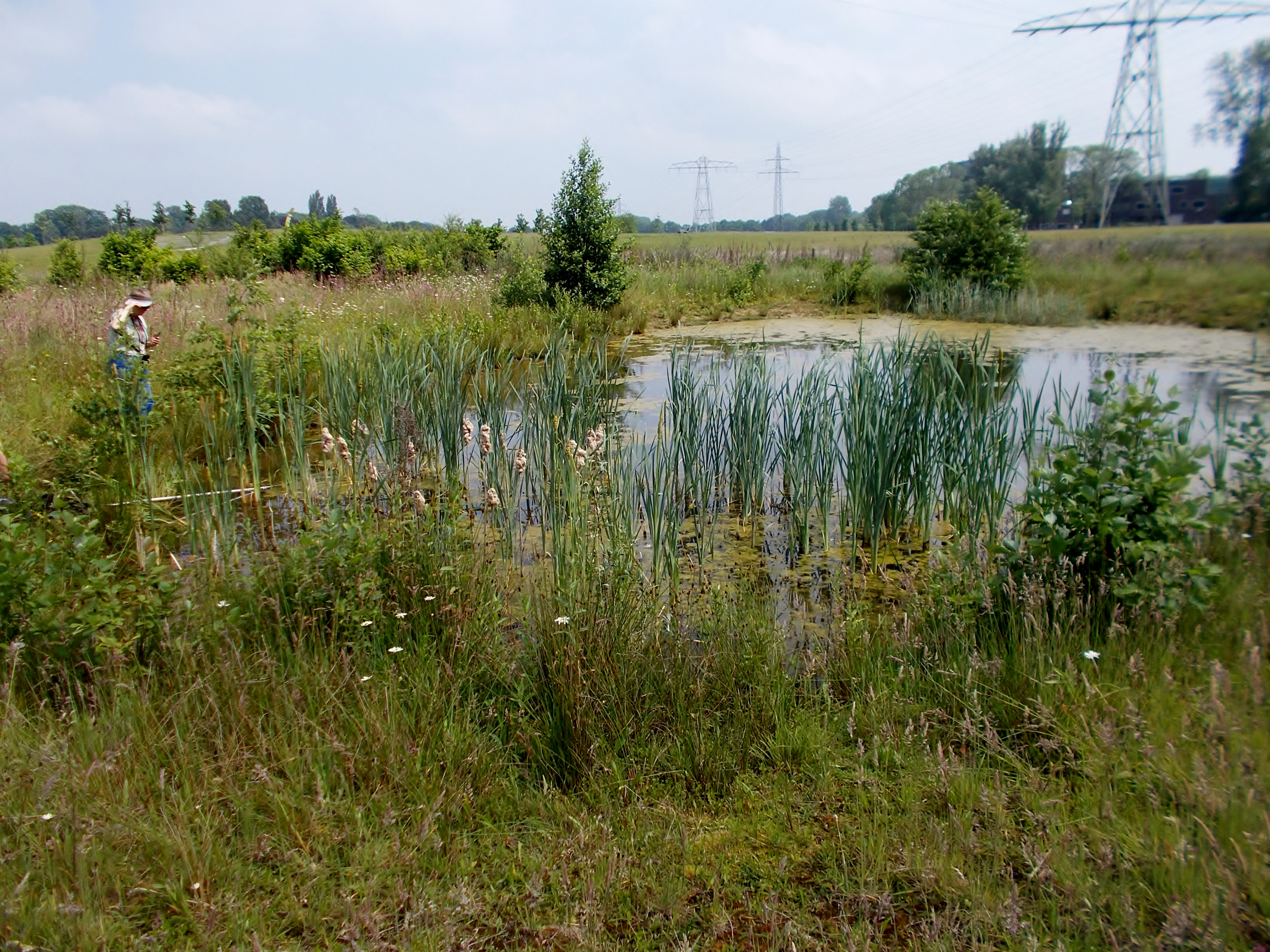 Een van de poelen in het Zandweteringpark in 2016